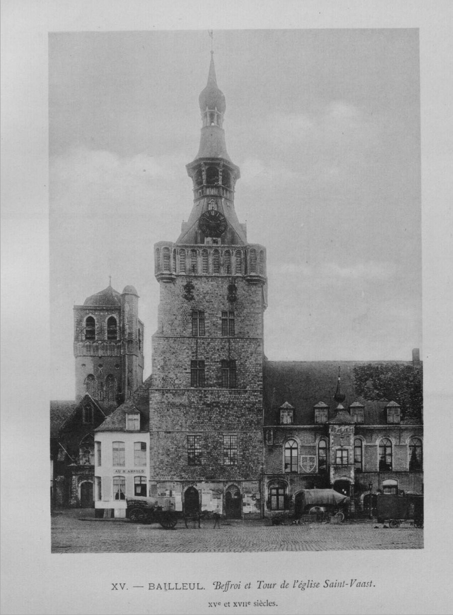 Bailleul : beffroi et tour de St-Vaast avant leur destruction en 1914-18 (Le Nord Monumental et Artistique Planche XV 1897)